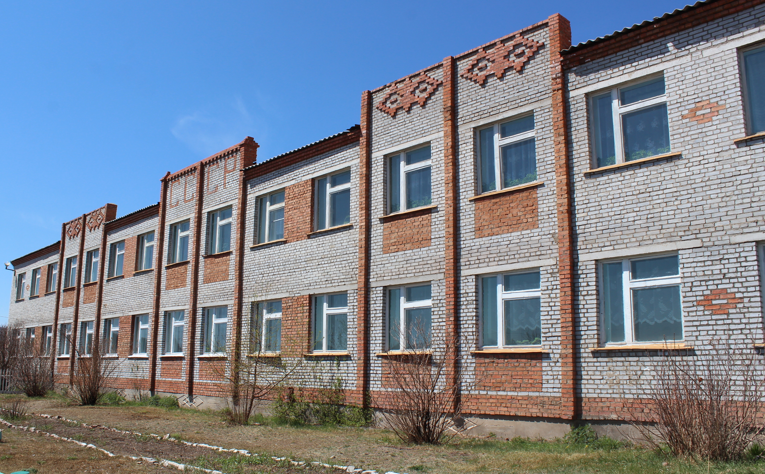 Средняя школа в селе Армак. Восточная Сибирь, Бурятия, Джидинский район